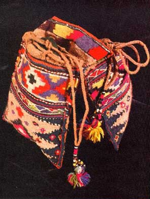 Xurcun - Bu məişət əşyası əsasən müxtəlif rəngli yun ipdən (bəzən iplikdən) xalça texnikası ilə toxunur, qotazlarla bəzədilir.